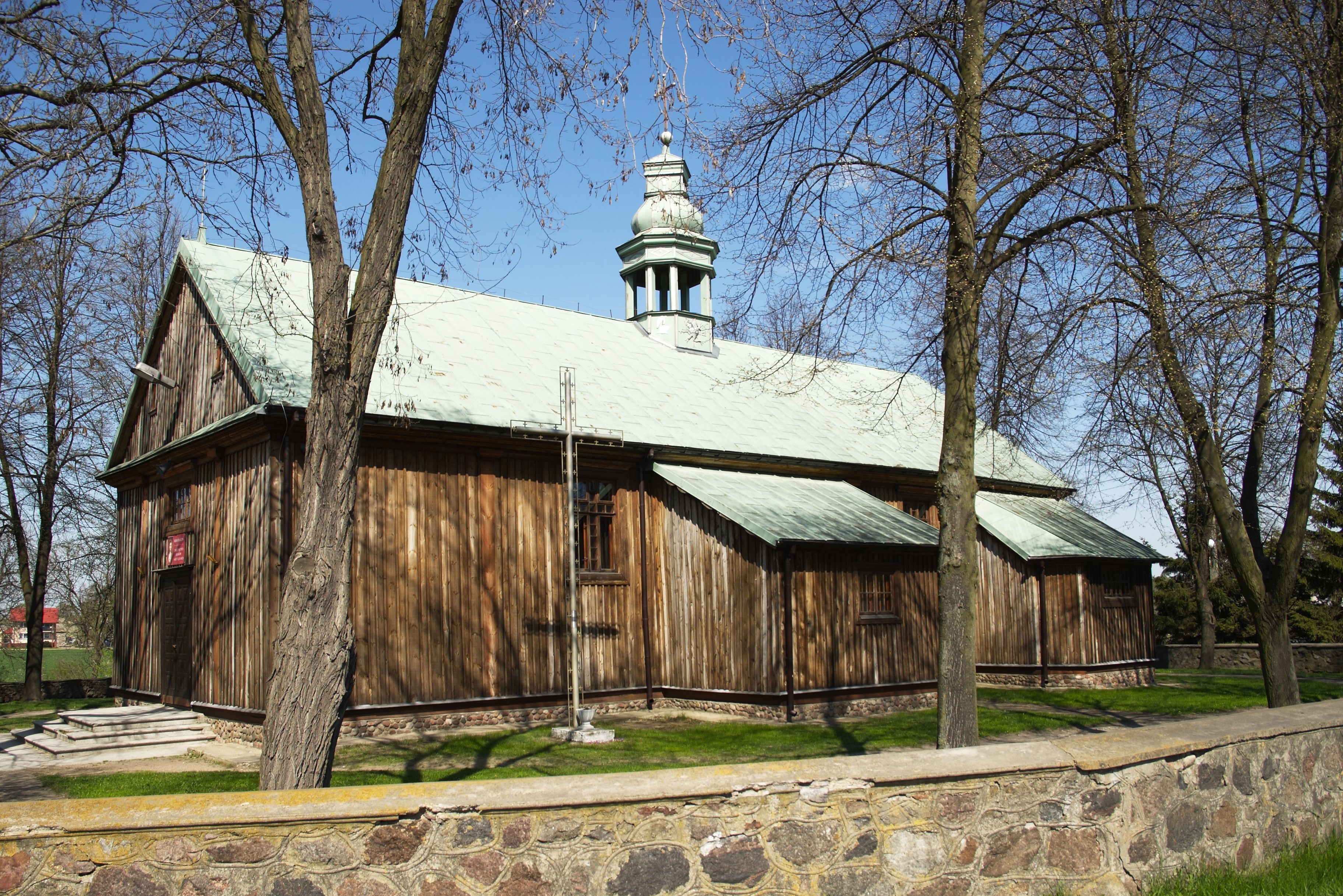 Kościół św. Jakuba Apostoła w Górze (powiat płocki, gmina Staroźreby).